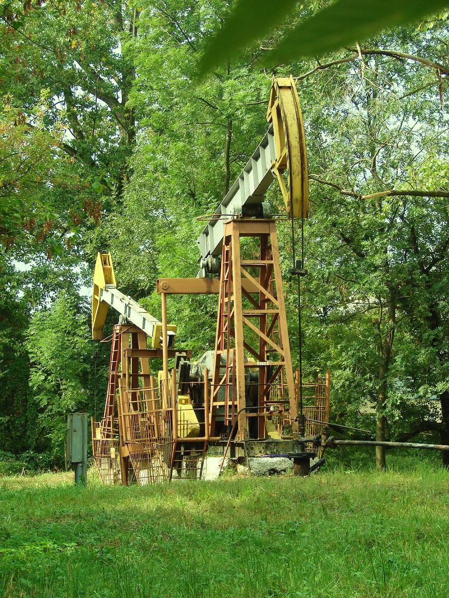 Борислав_парк_качалки: Нафтові качалки у Бориславському парку